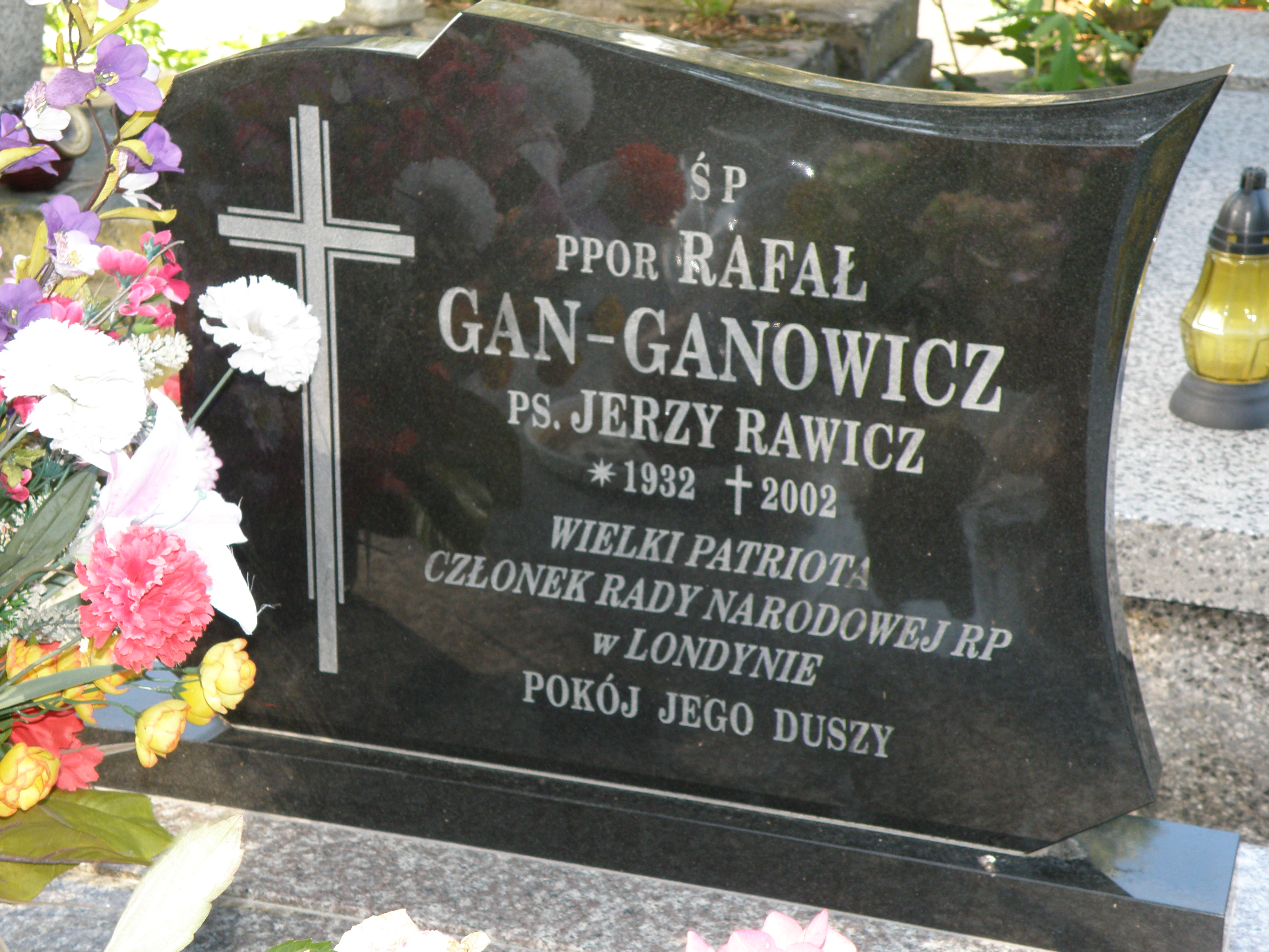 Rafał Gan‐Ganowicz (1932-2002) – polski żołnierz RP na uchodźstwie, najemnik, dziennikarz, korespondent Rozgłośni Polskiej Radia Wolna Europa - ps. Jerzy Rawicz, działacz polityczny i społeczny.